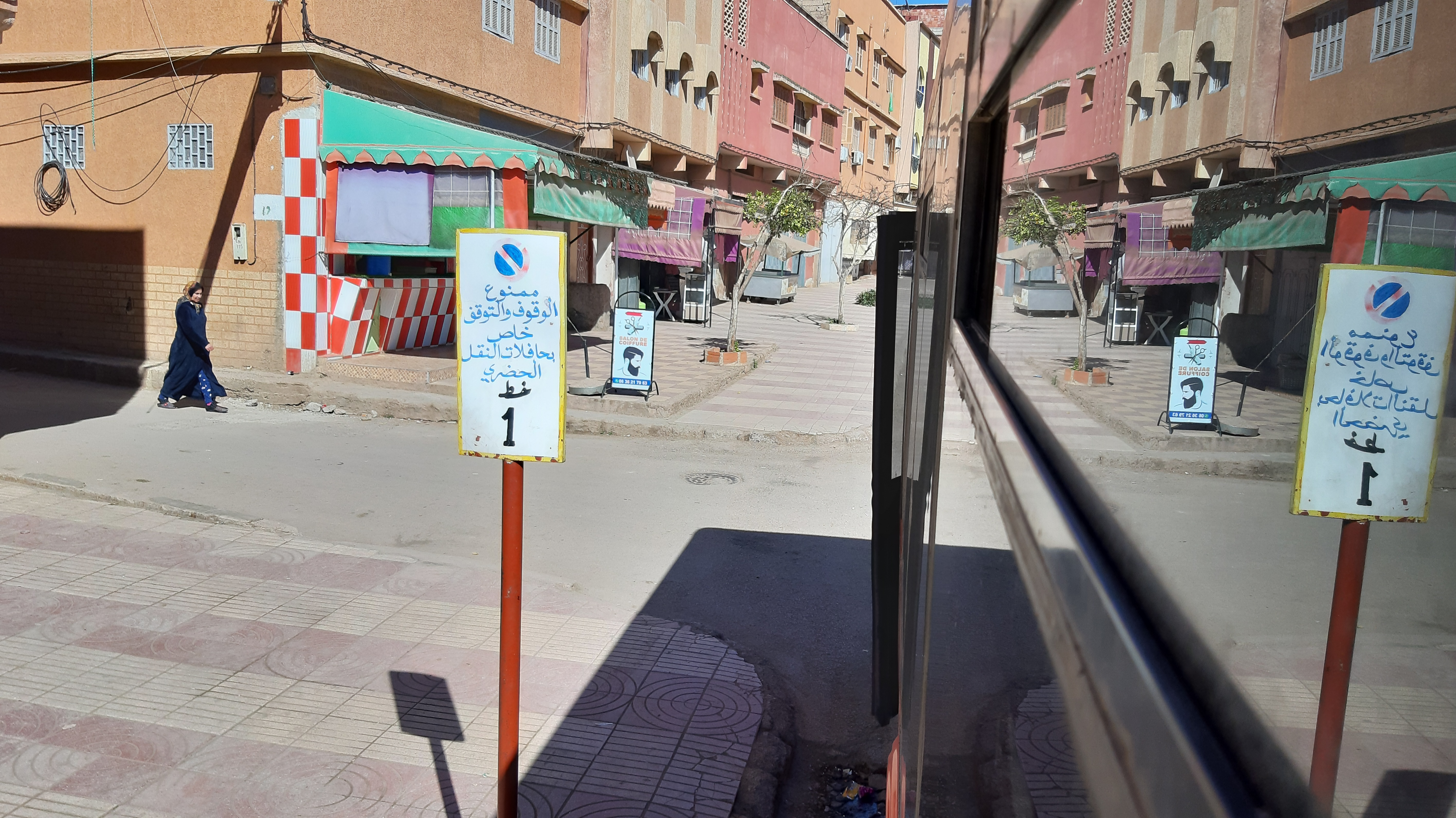 Arrêt de bus, Amalou, Khenifra, Maroc This is an image with the theme "Africa on the Move or Transport" from: Morocco